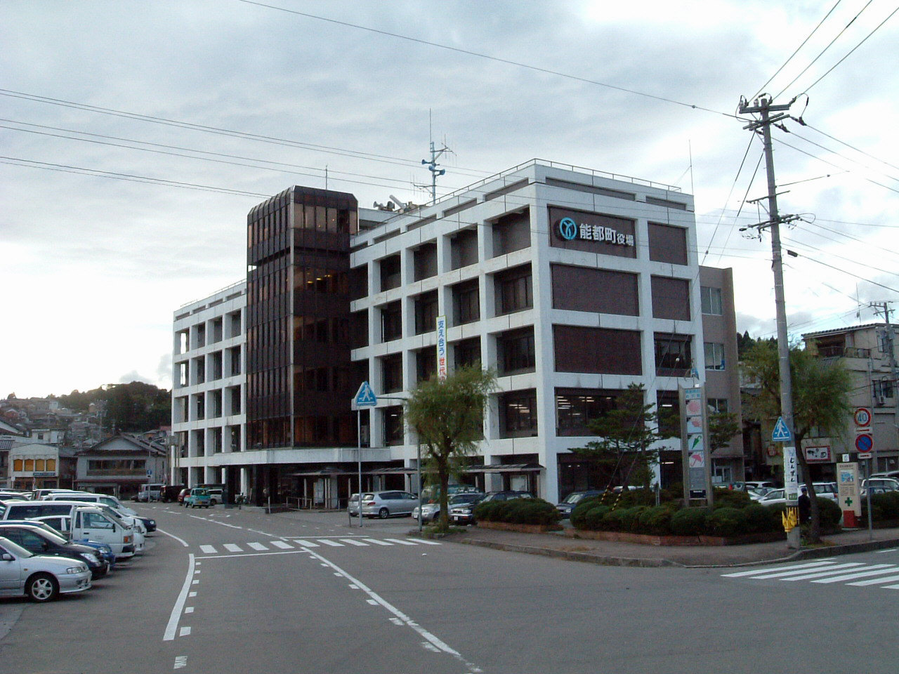 旧能都町役場（現能登町役場）